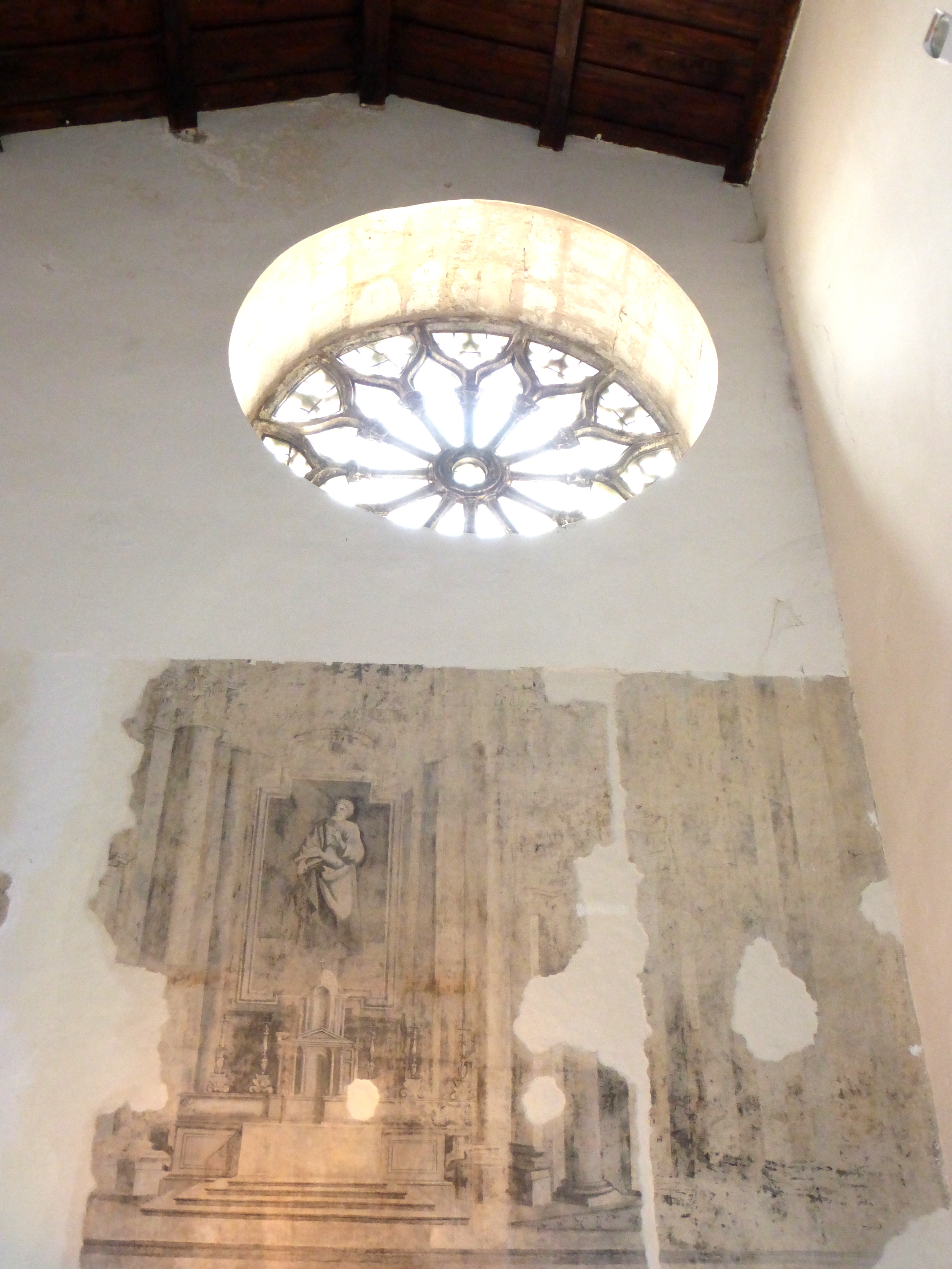 Chiesa di Santa Maria delle Grazie a Magliano de' Marsi (AQ)